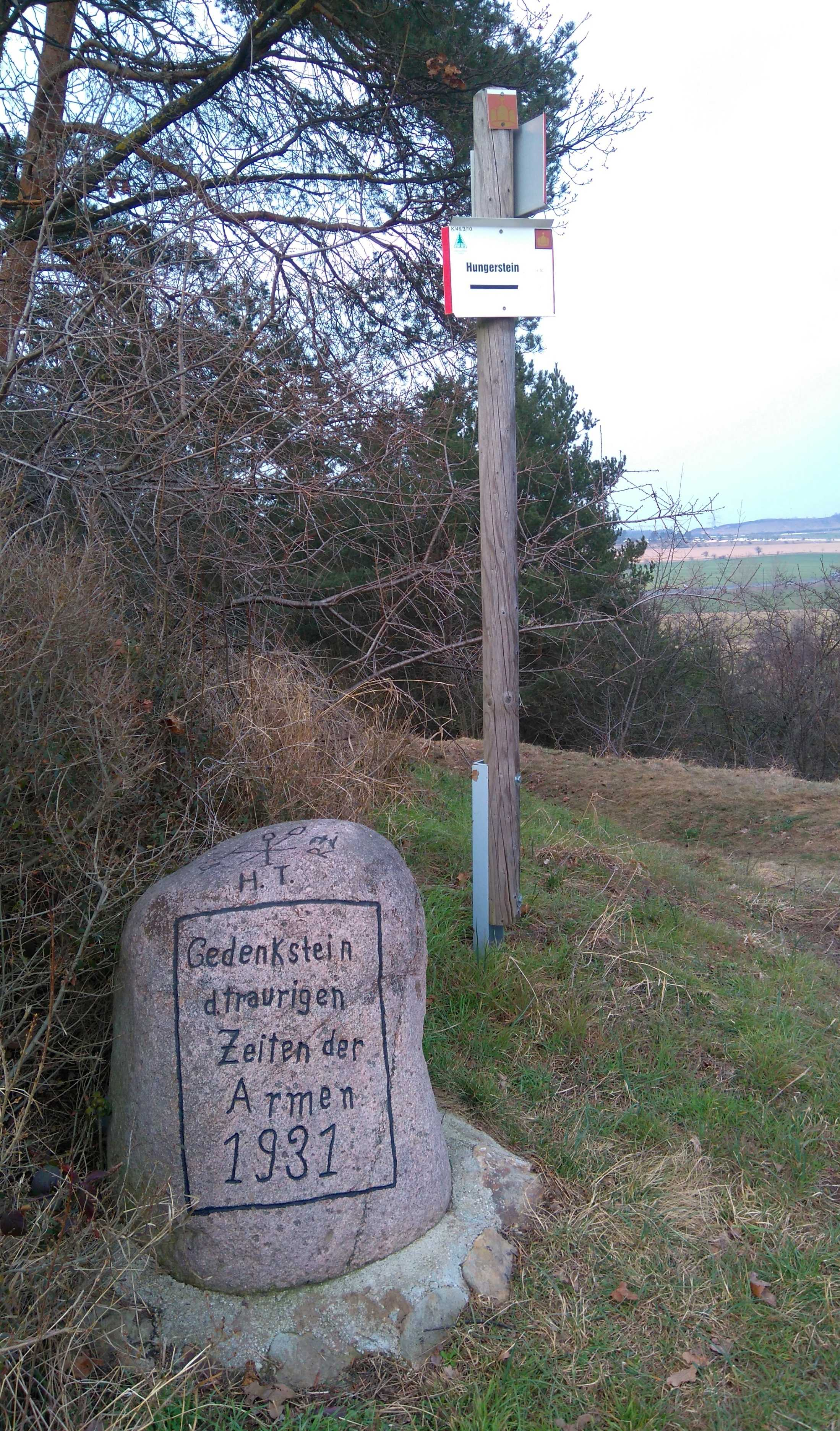 Hungerstein bei Westerhausen